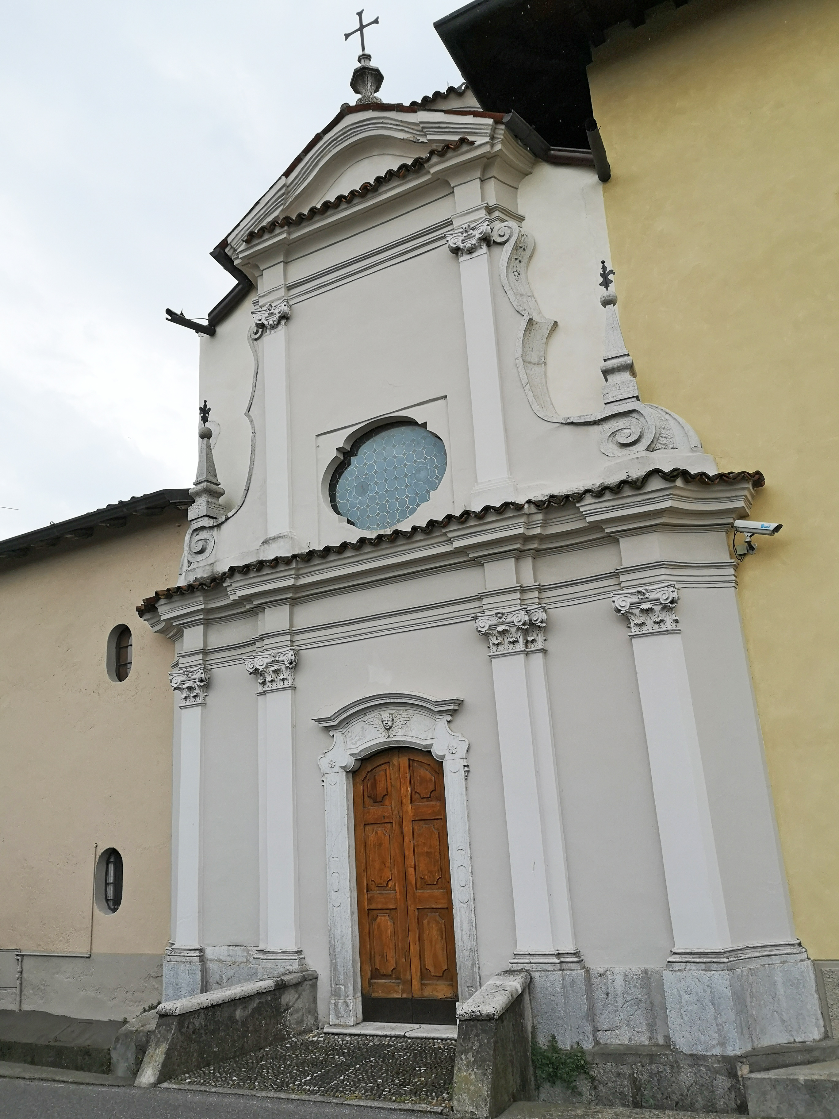 Chiesetta di San Gaetano, Travagliato